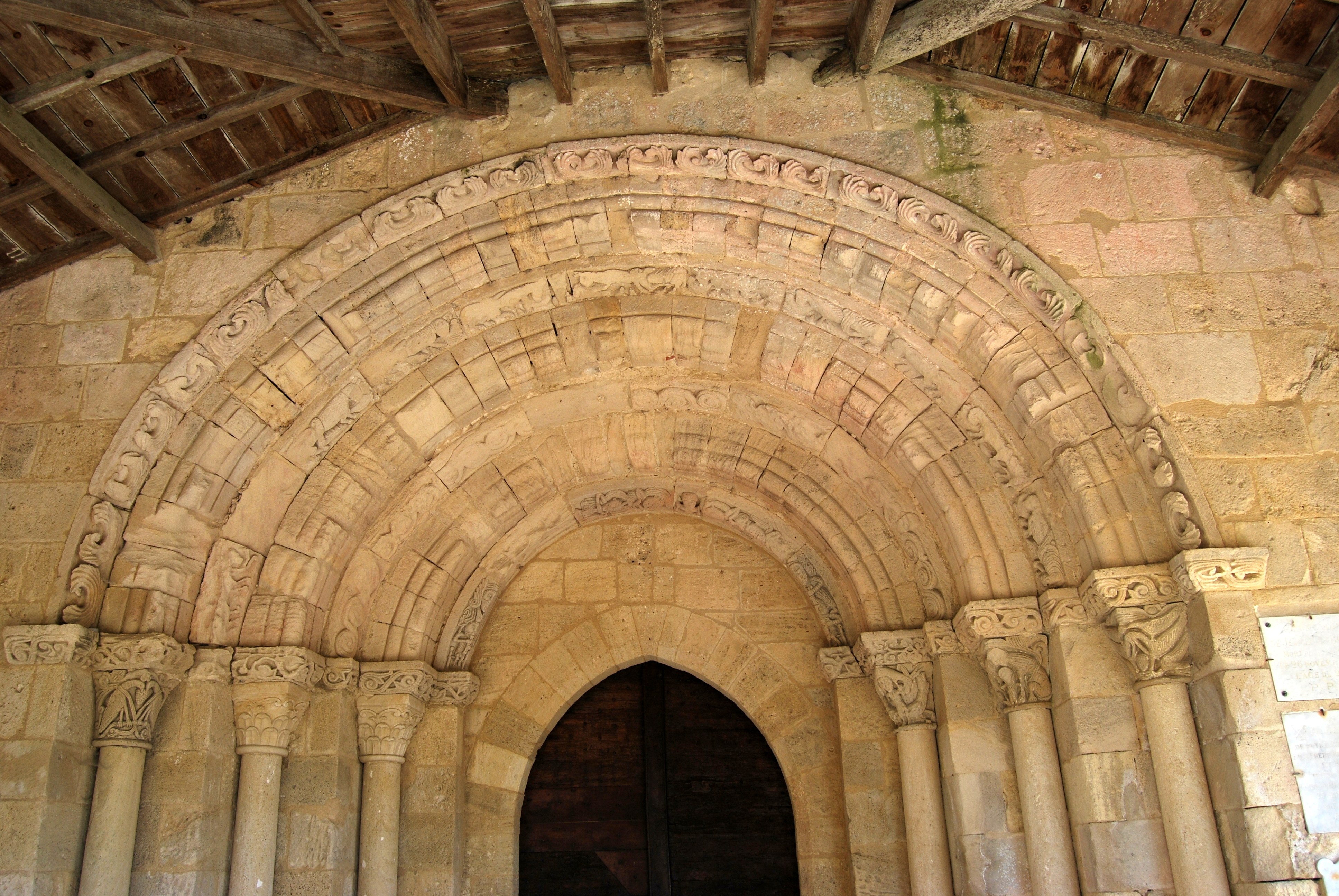 Portail de l'église Saint-Martin de Jugazan